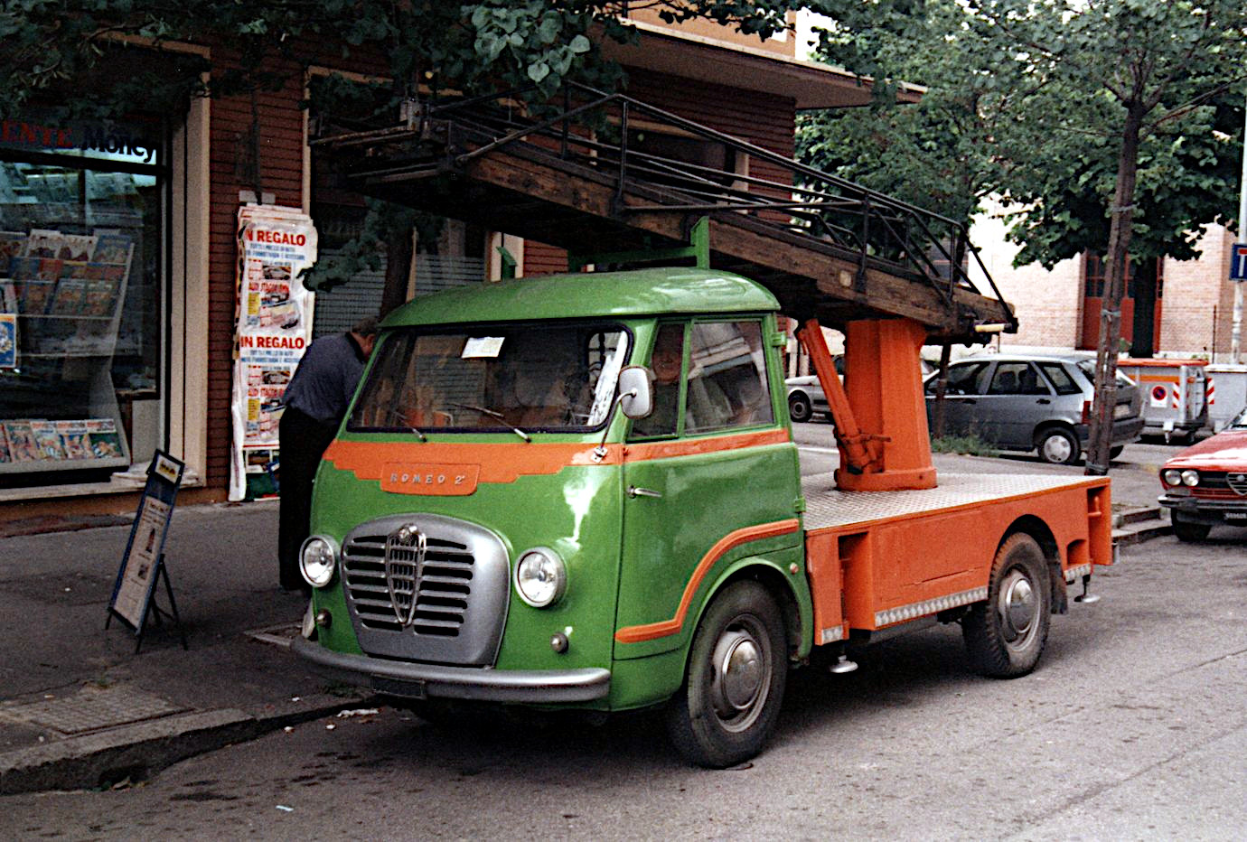 Quelle: Harald H. Linz Fotograf: Harald H. Linz Mit ausdrücklicher Genehmigung von Harald. H. Linz für Wiki eingestellt.